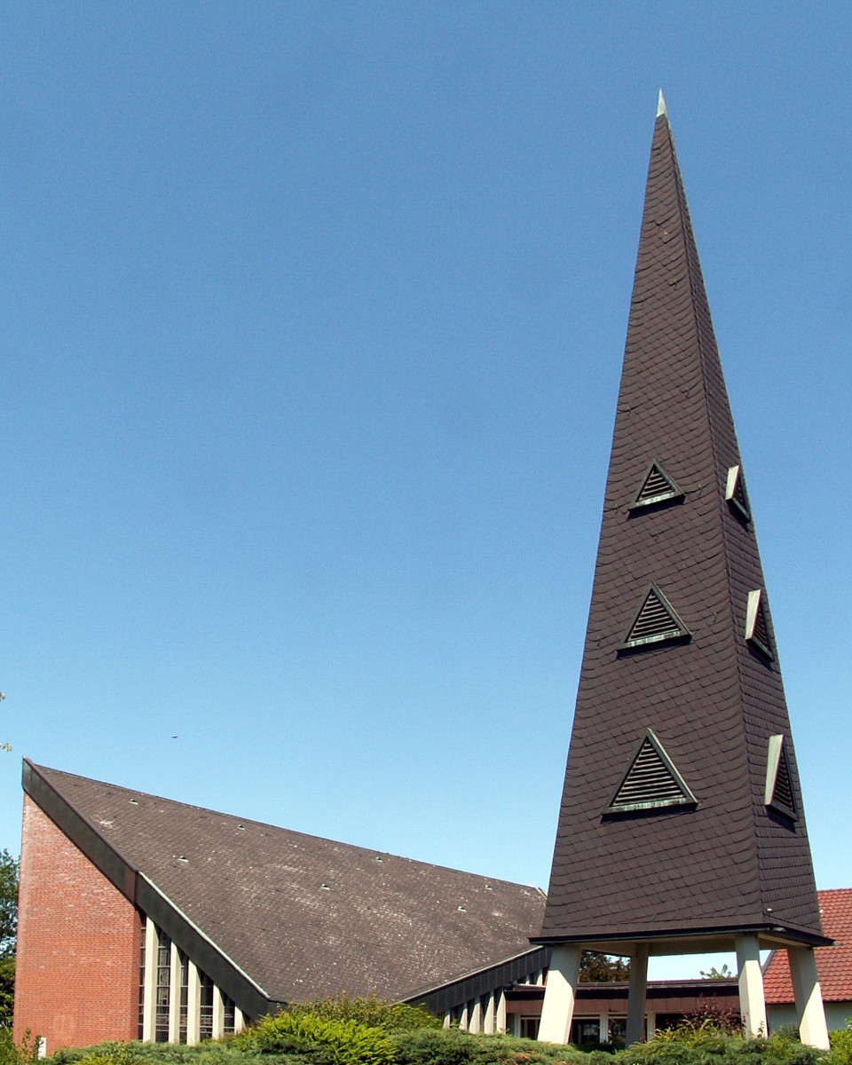 ev. Versöhnungskirche in Bünde, Stadtteil Südlengern, Ansicht von Südosten